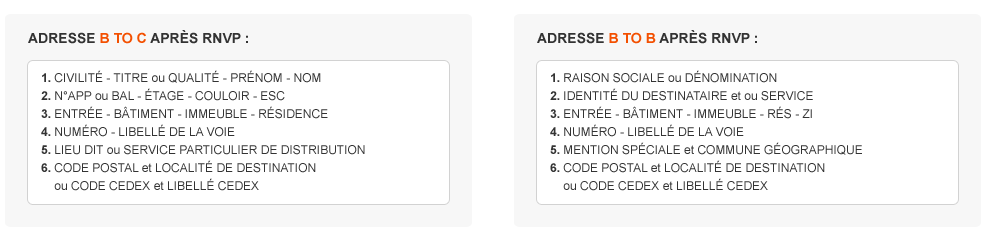 Règle d'écriture d'une adresse postale selon la norme AFNOR XP Z 10-011